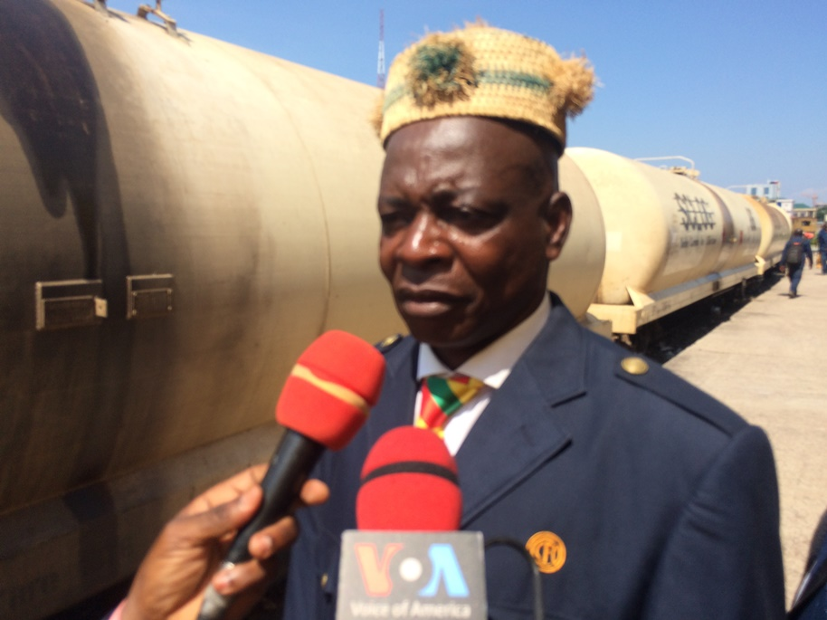 Un cheminot à la gare de Brazzaville lors de la réception du premier train, au Congo, le 28 novembre 2018. (VOA/Arsène Séverin) Un tout premier train, parti de Pointe-Noire, a pu rallier la capitale après deux ans d'interruption de trafic à cause de la guerre dans le Pool. Ce train, qui transportait du carburant, est considéré comme un signe de retour à la paix.